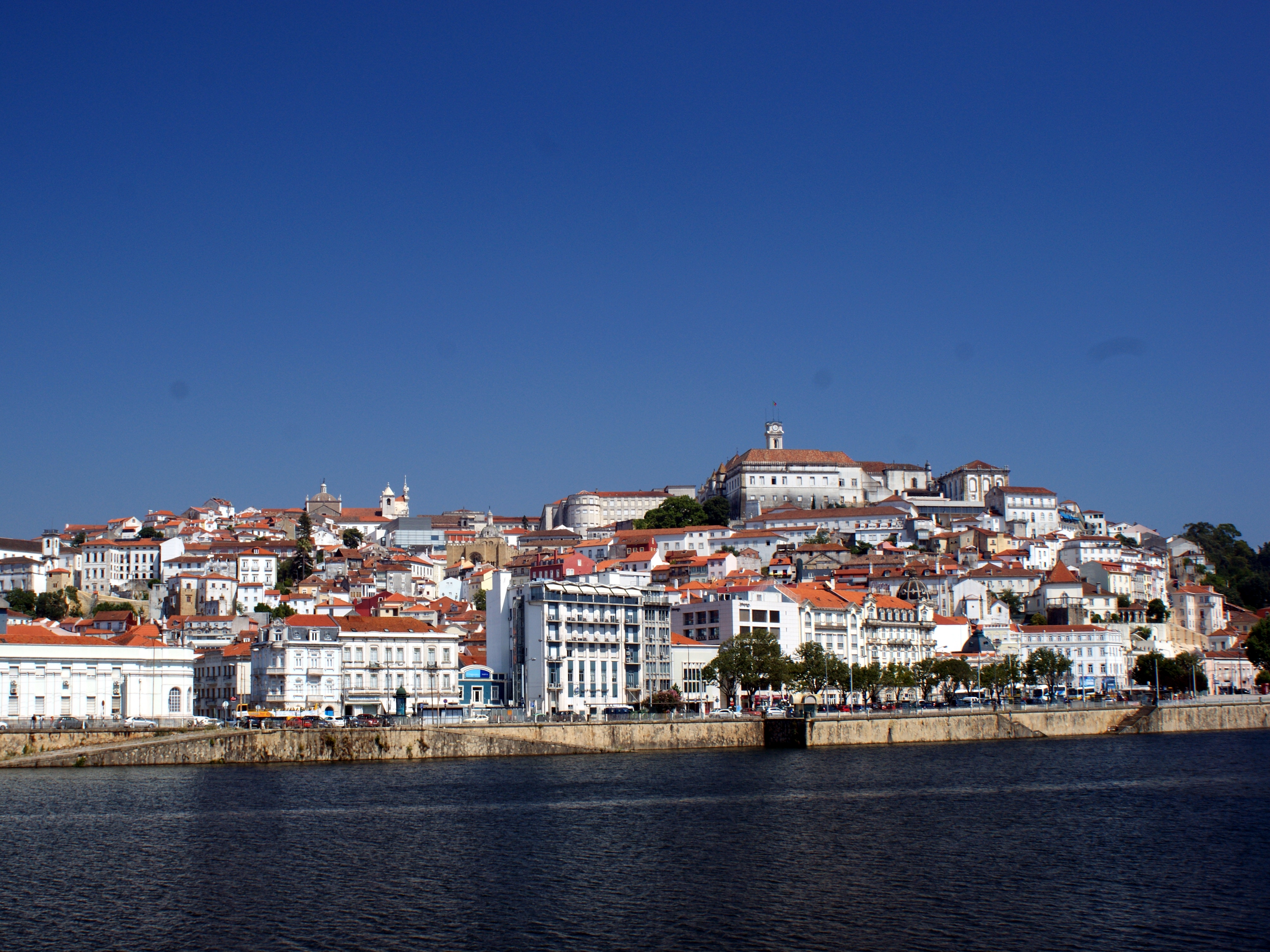 Coimbra vom gegenüberliegenden (unspektakulären) Ufer aus.